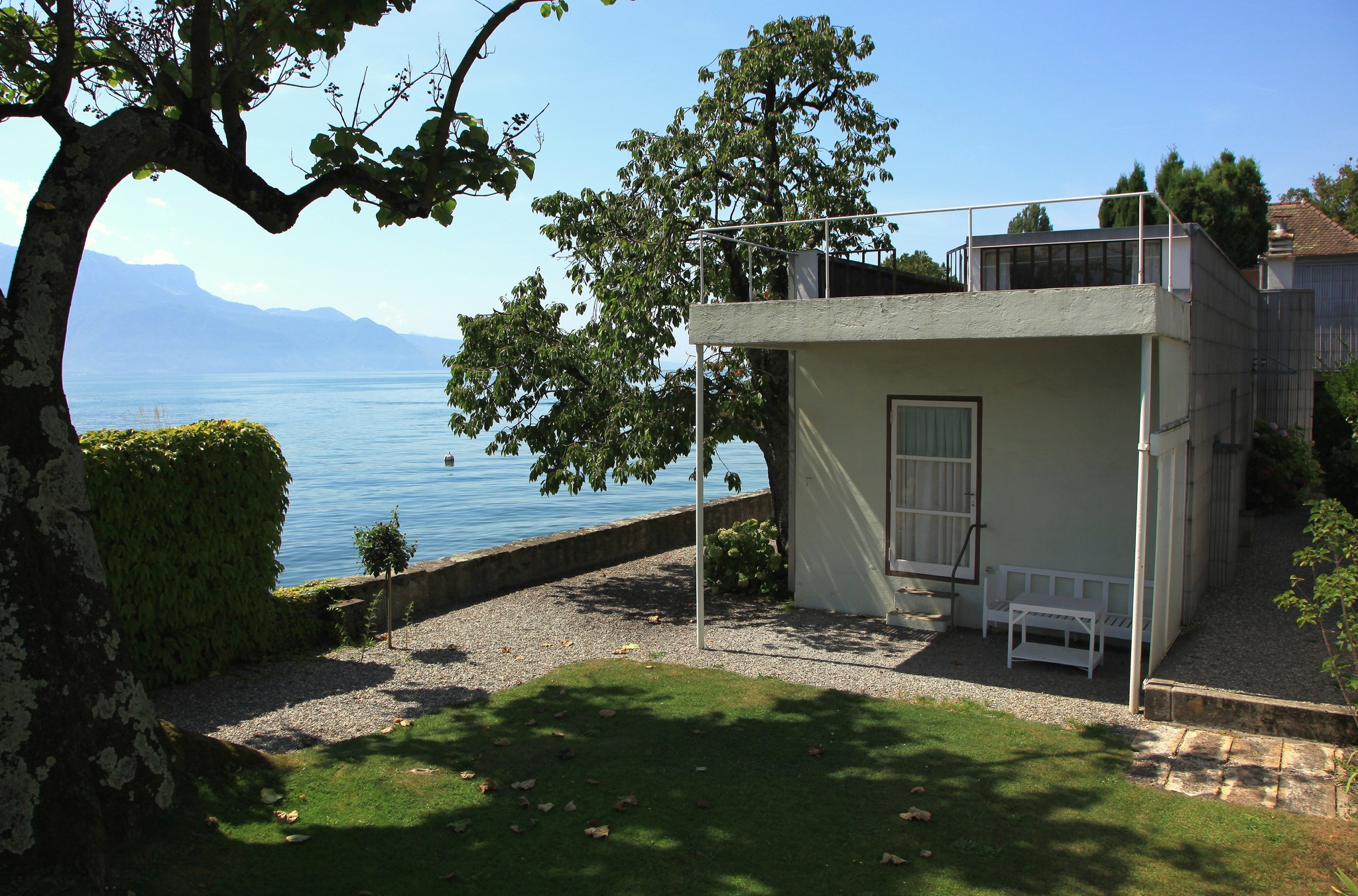 Corseaux